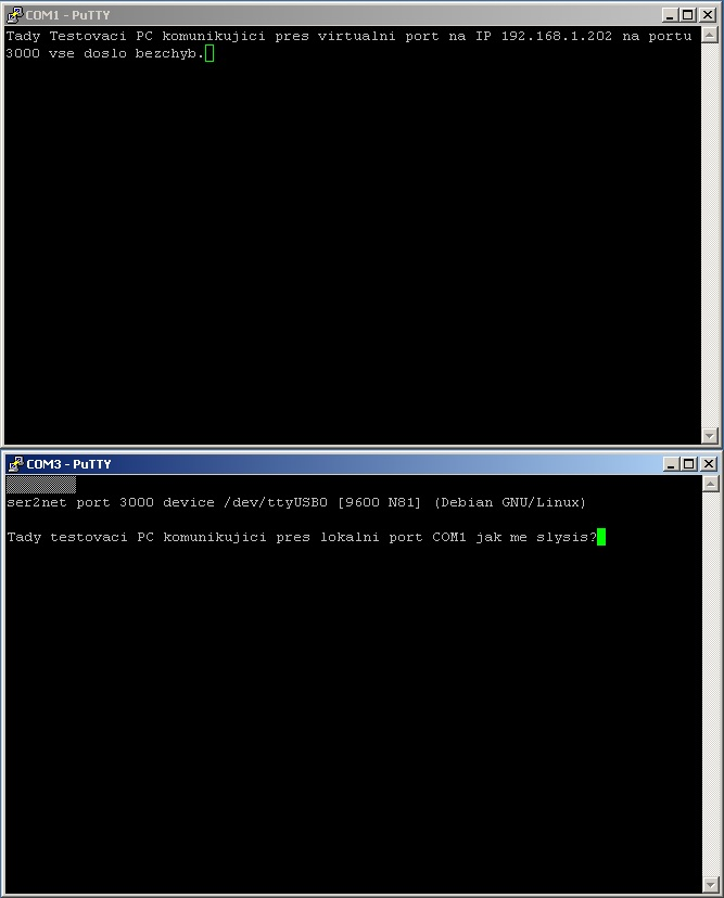 Komunikační rozhraní otevřené na lokální a virtuální port pomocí Putty